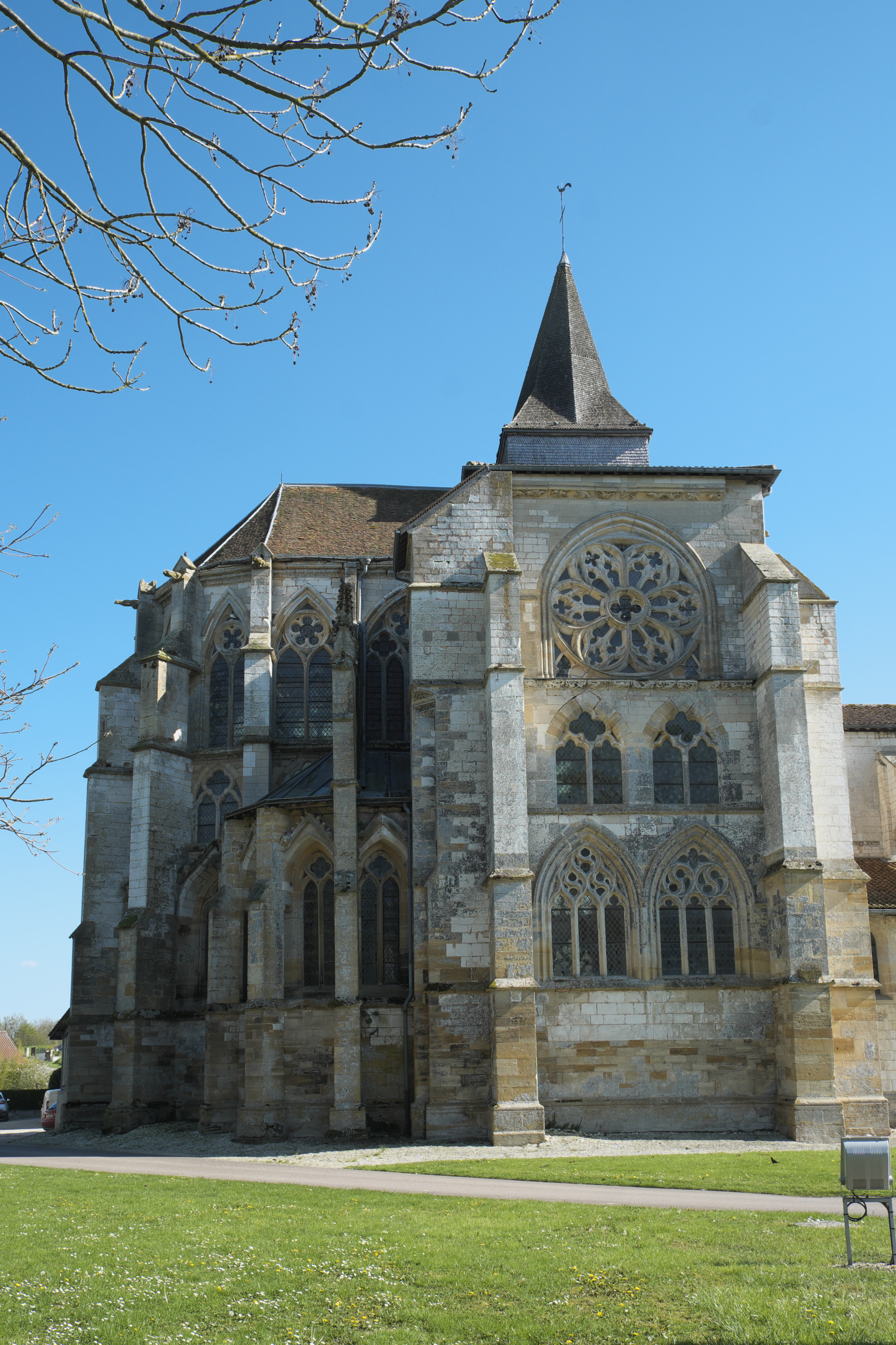 Katholische Pfarrkirche Saint-Amand in Saint-Amand-sur-Fion im Département Marne in der Region Grand Est/Frankreich, Chor und südliches Querhaus